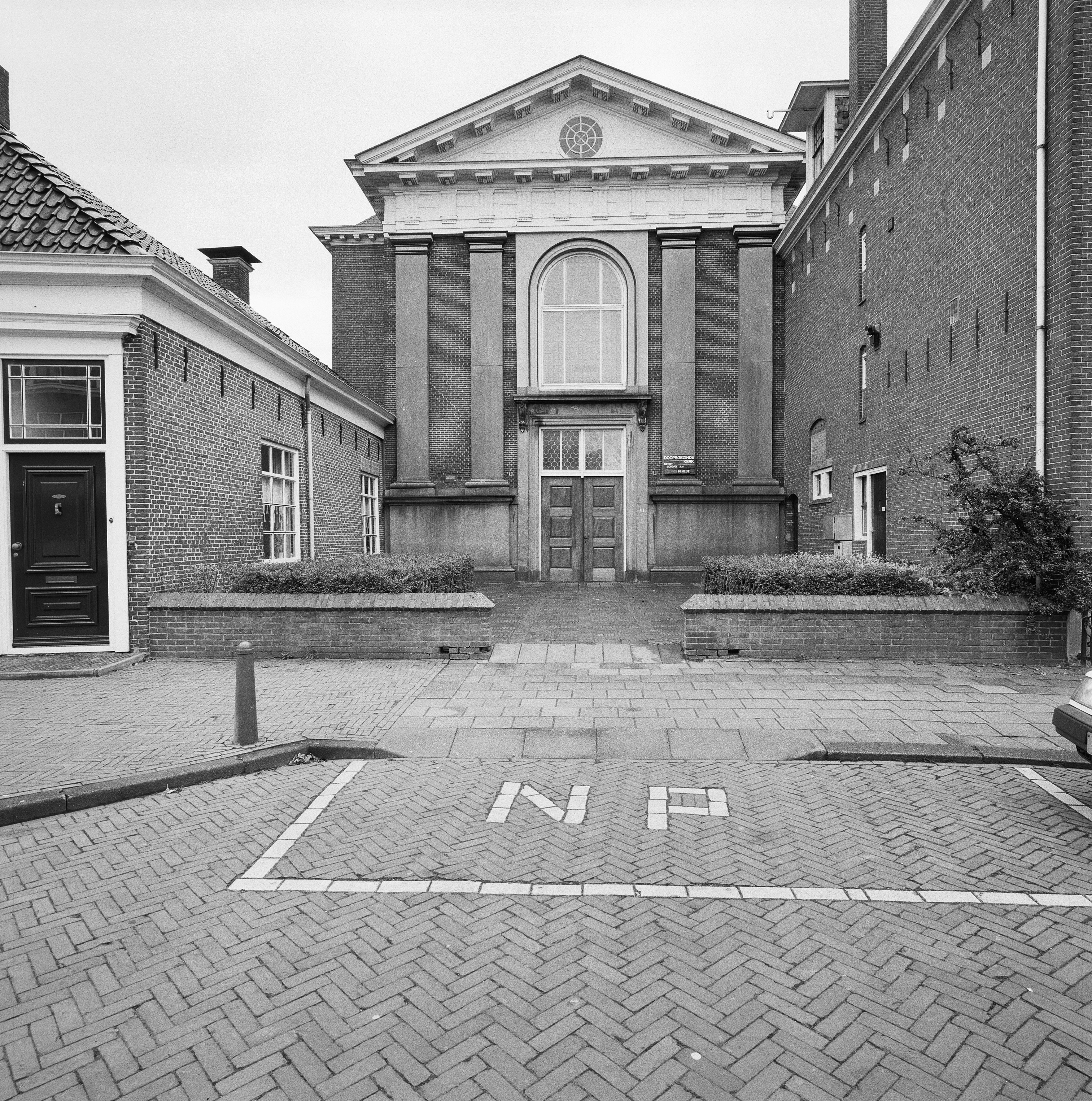 DOOPSGEZINDE KERK: Exterieur OVERZICHT WESTGEVEL